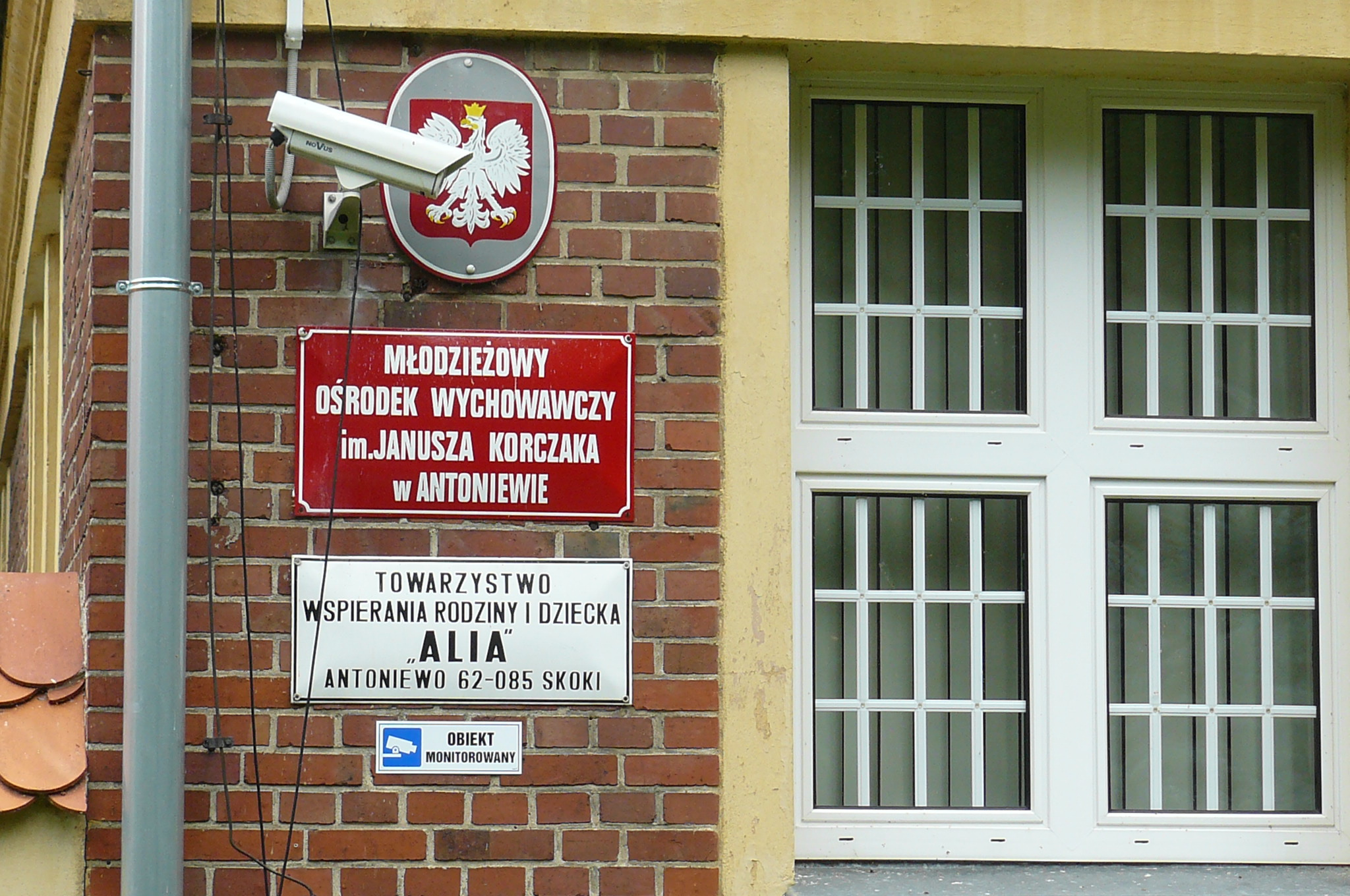 Młodzieżowy Ośrodek Wychowawczy im. Janusza Korczaka w Antoniewie (1914r., brama z 1938r.).